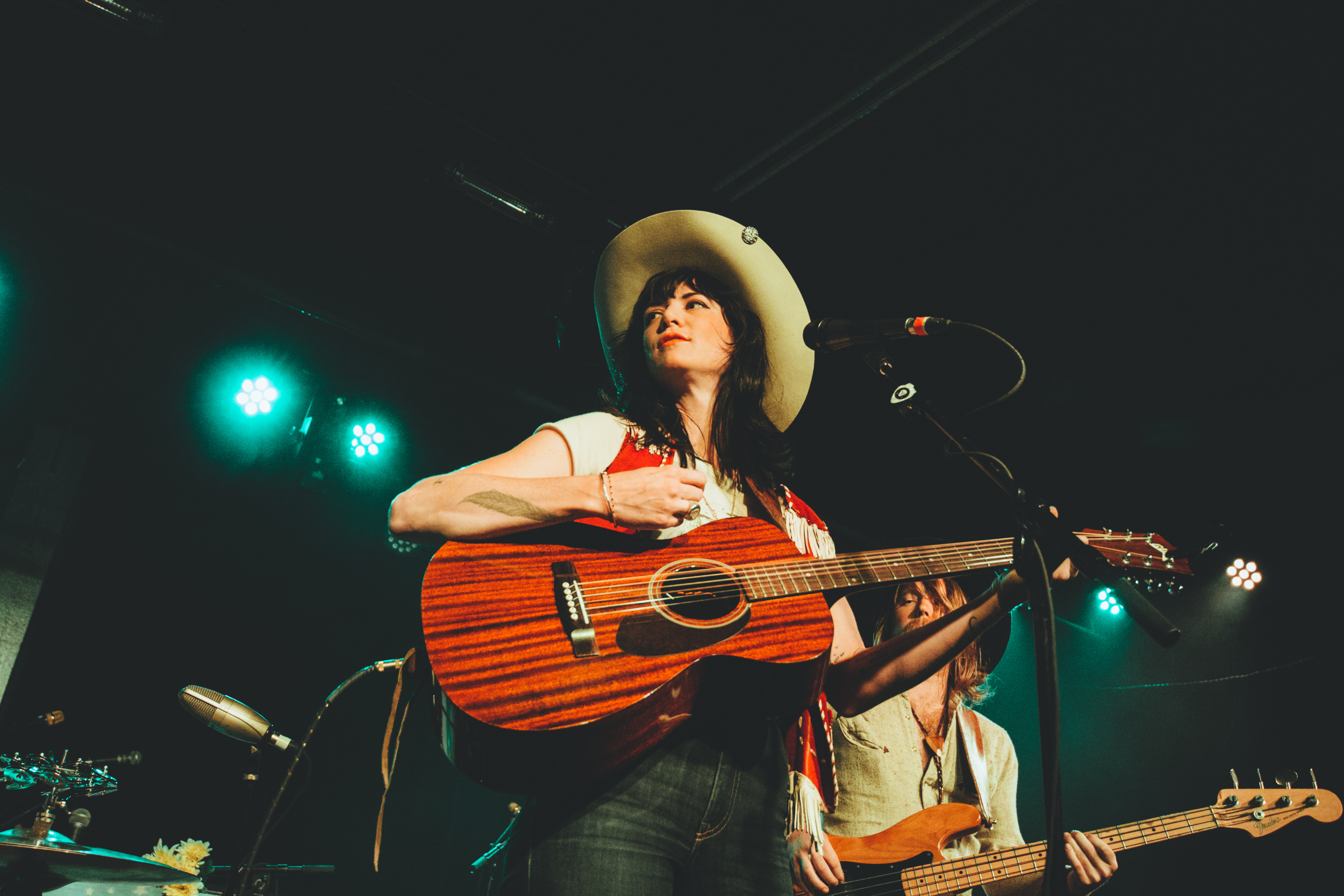 Nikki_Lane-1759